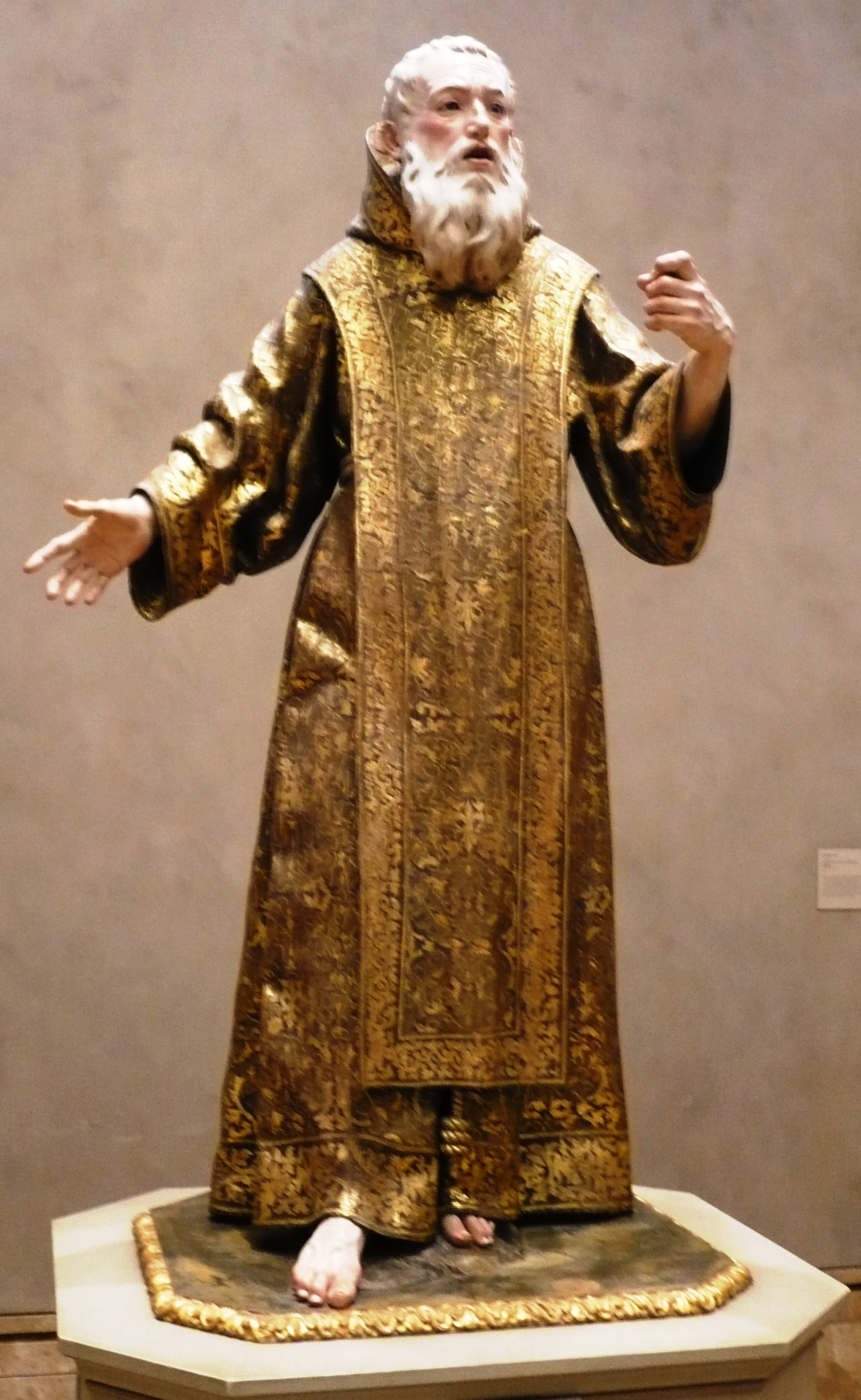 Saint Ginés de la Jara (also known as Ginés de la Xara, Ginés el Franco, Genesius Sciarensis), semi-legendary saint of Spain. Statue by "La Roldana," Luisa Ignacia Roldán.